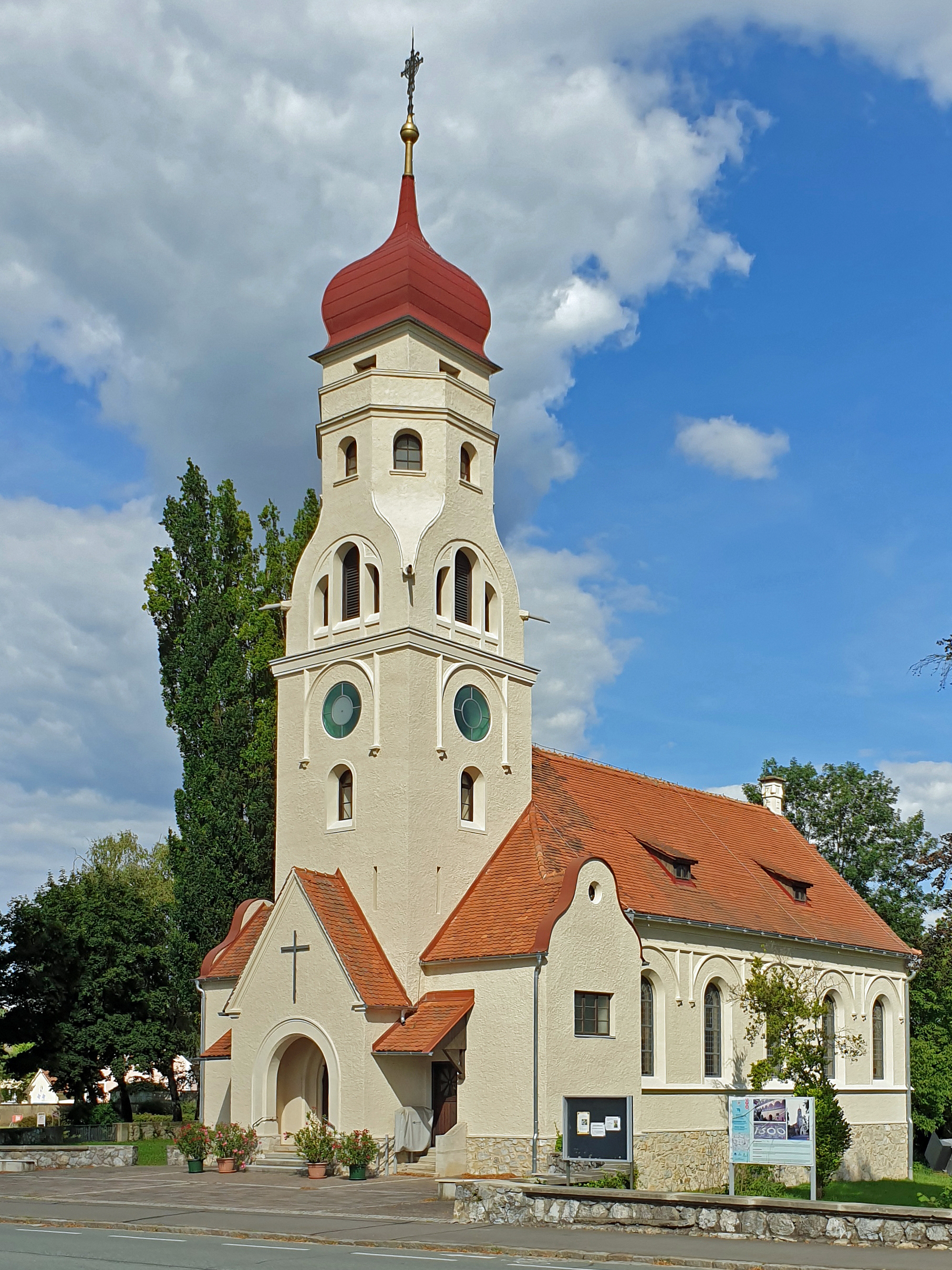 Evang. Pfarrkirche A.B.